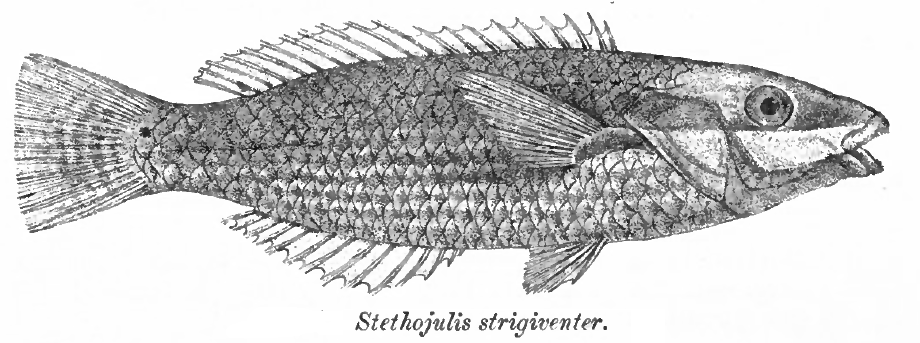 Stethojulis strigiventer (Bennett, 1833)